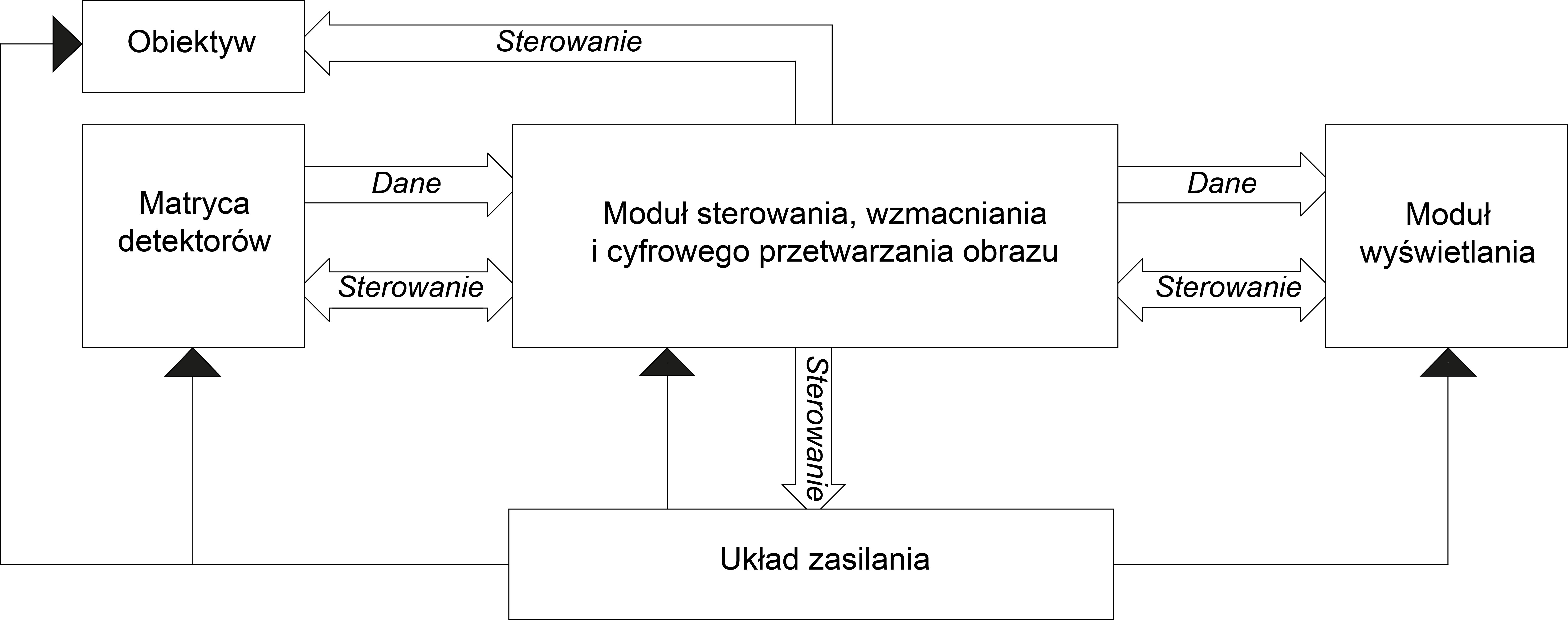 Schemat działania termowizora